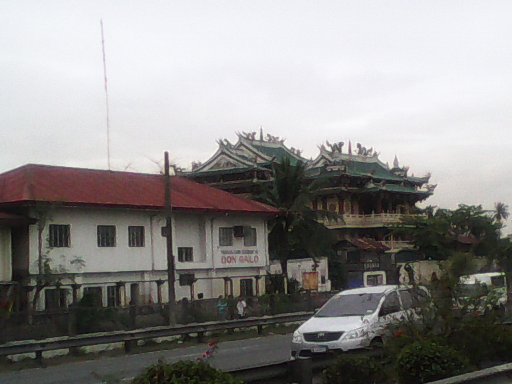 Don Galo, Parañaque, Metro Manila, Philippines